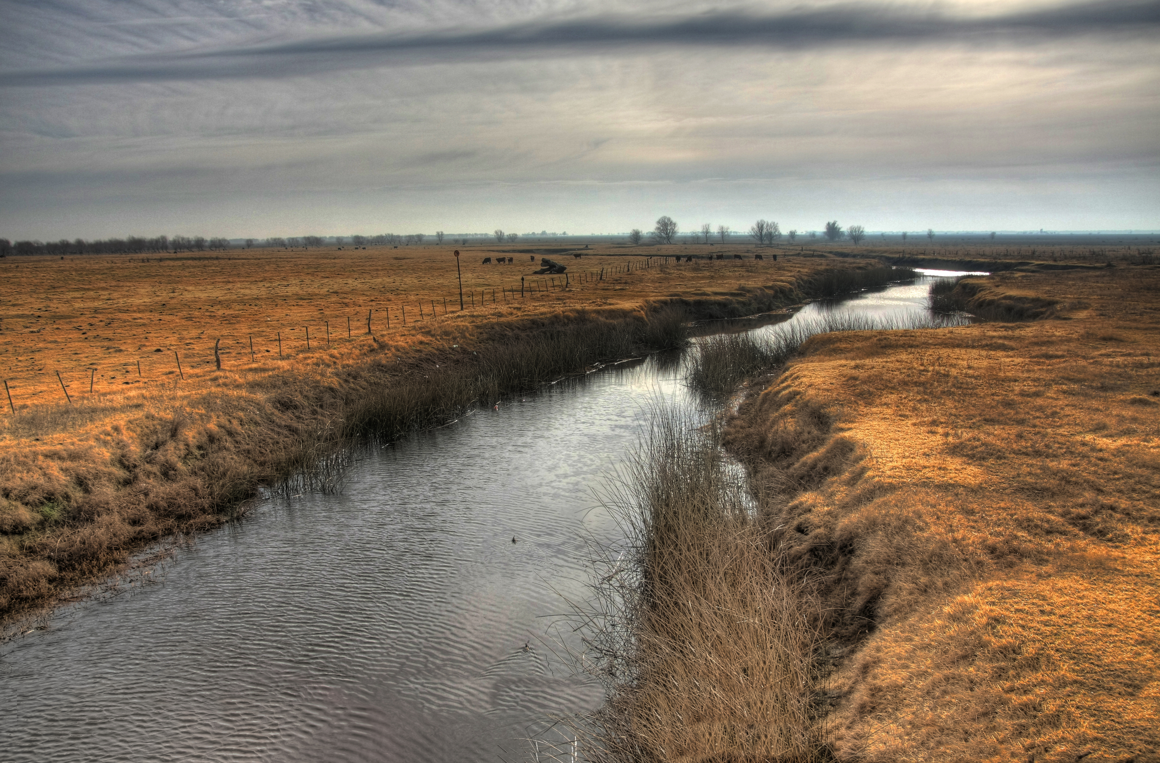 Luján River in San Pedro, Buenos Aires Province, Argentina